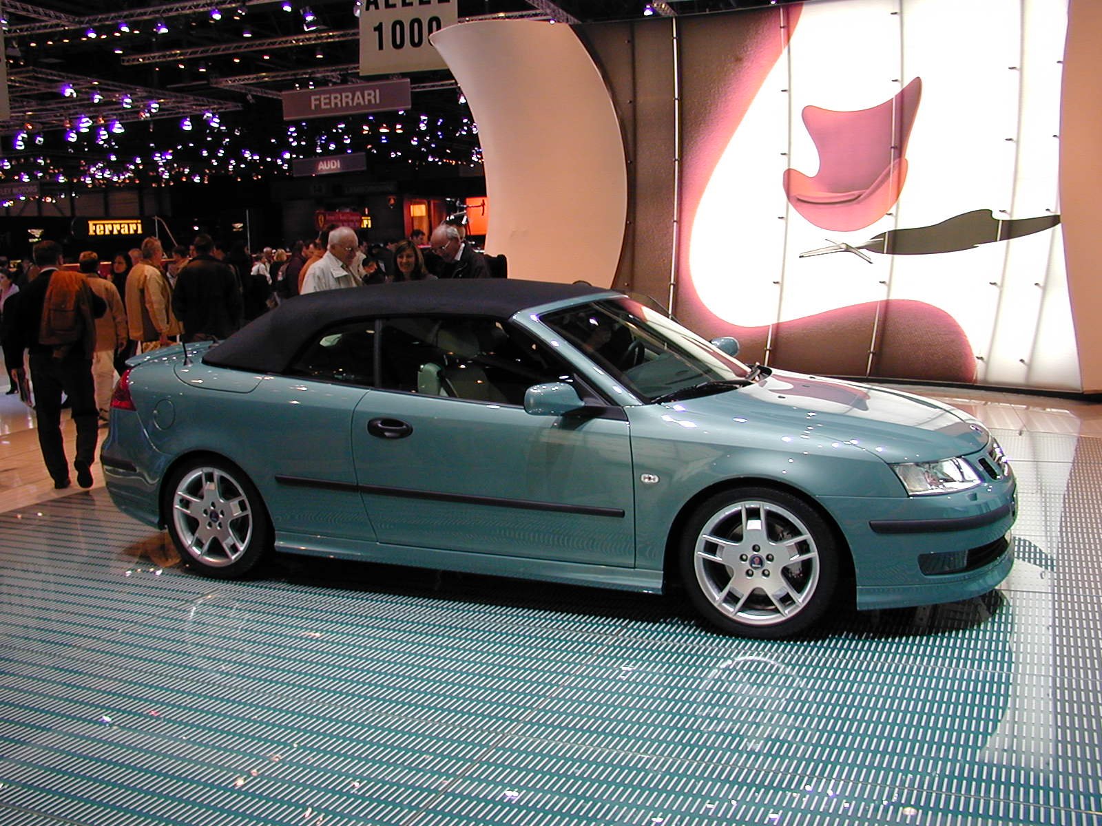 Salon de Genève 2004 SAG2004 224 Saab cabriolet